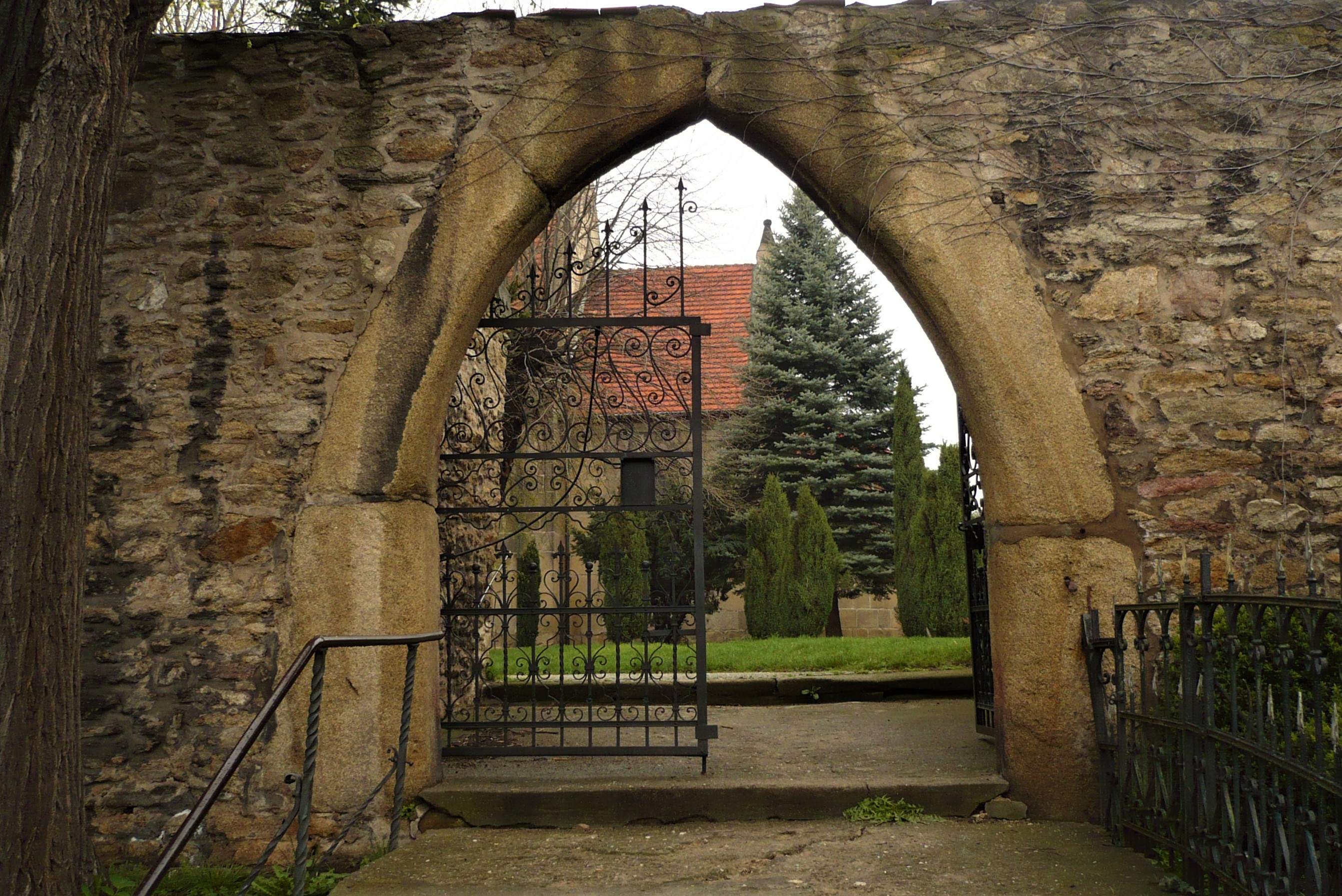 Kościół w Wierzbnej